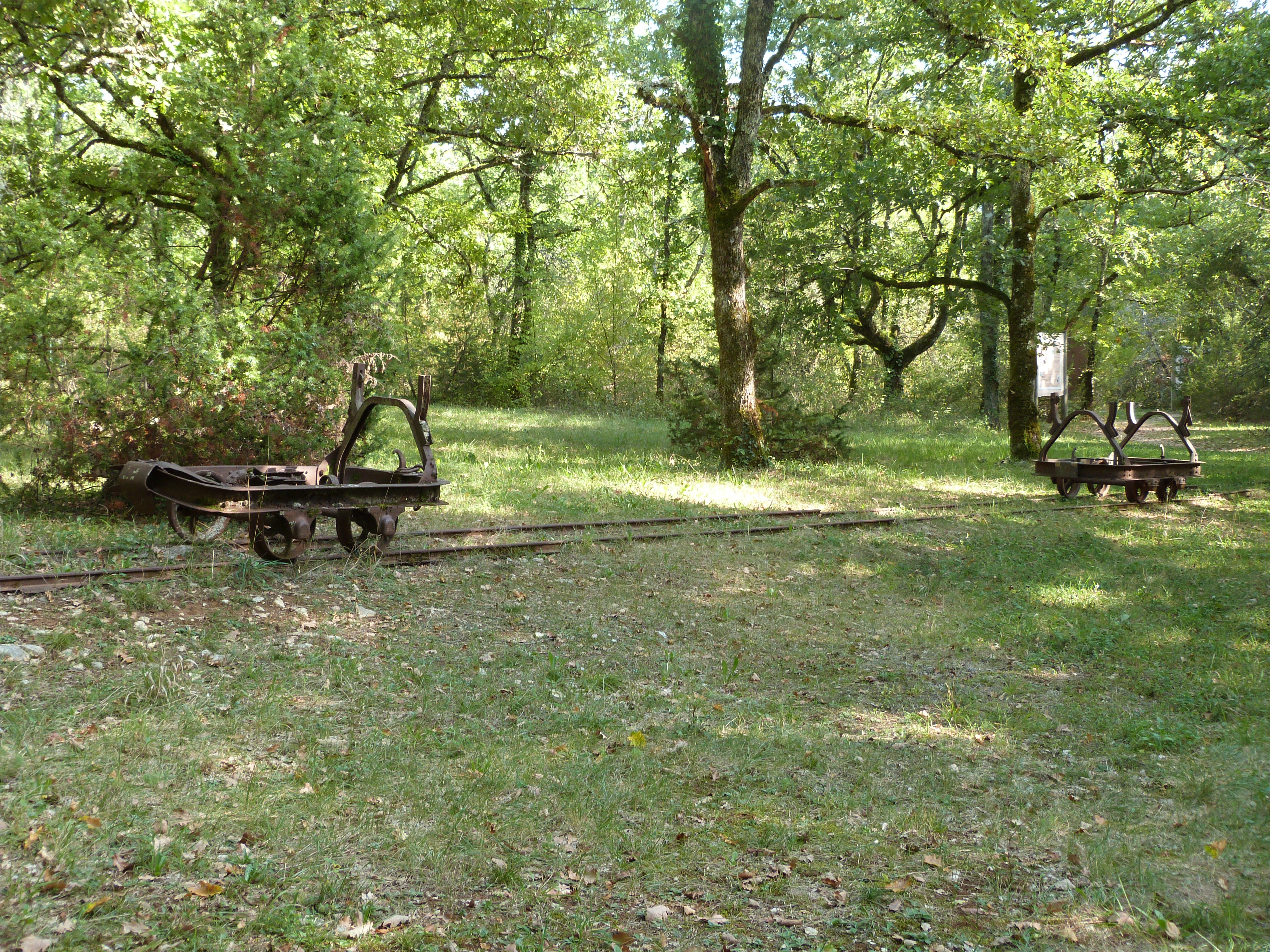 Phosphatière du Cloup d'Aural (Inscrit) .